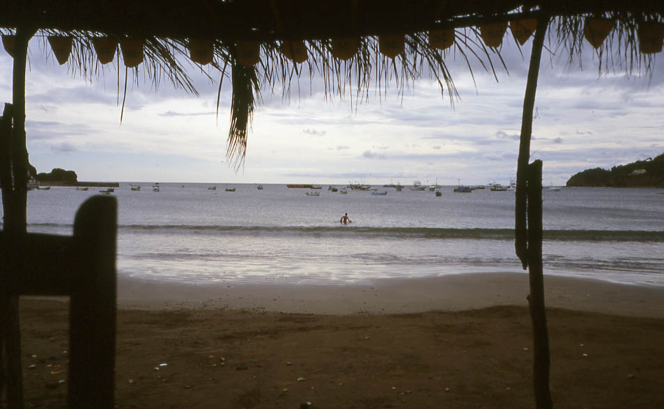 Bahía de San Juan del Sur. Nicaragua. 2002